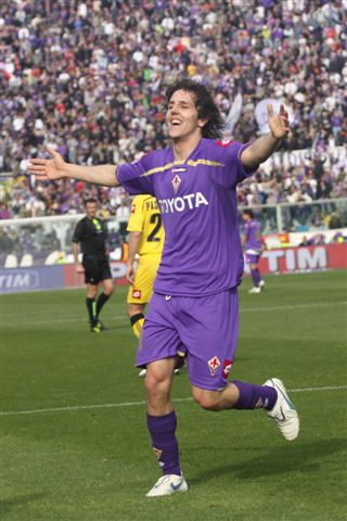 L'attaccante della Fiorentina Stevan Jovetić.